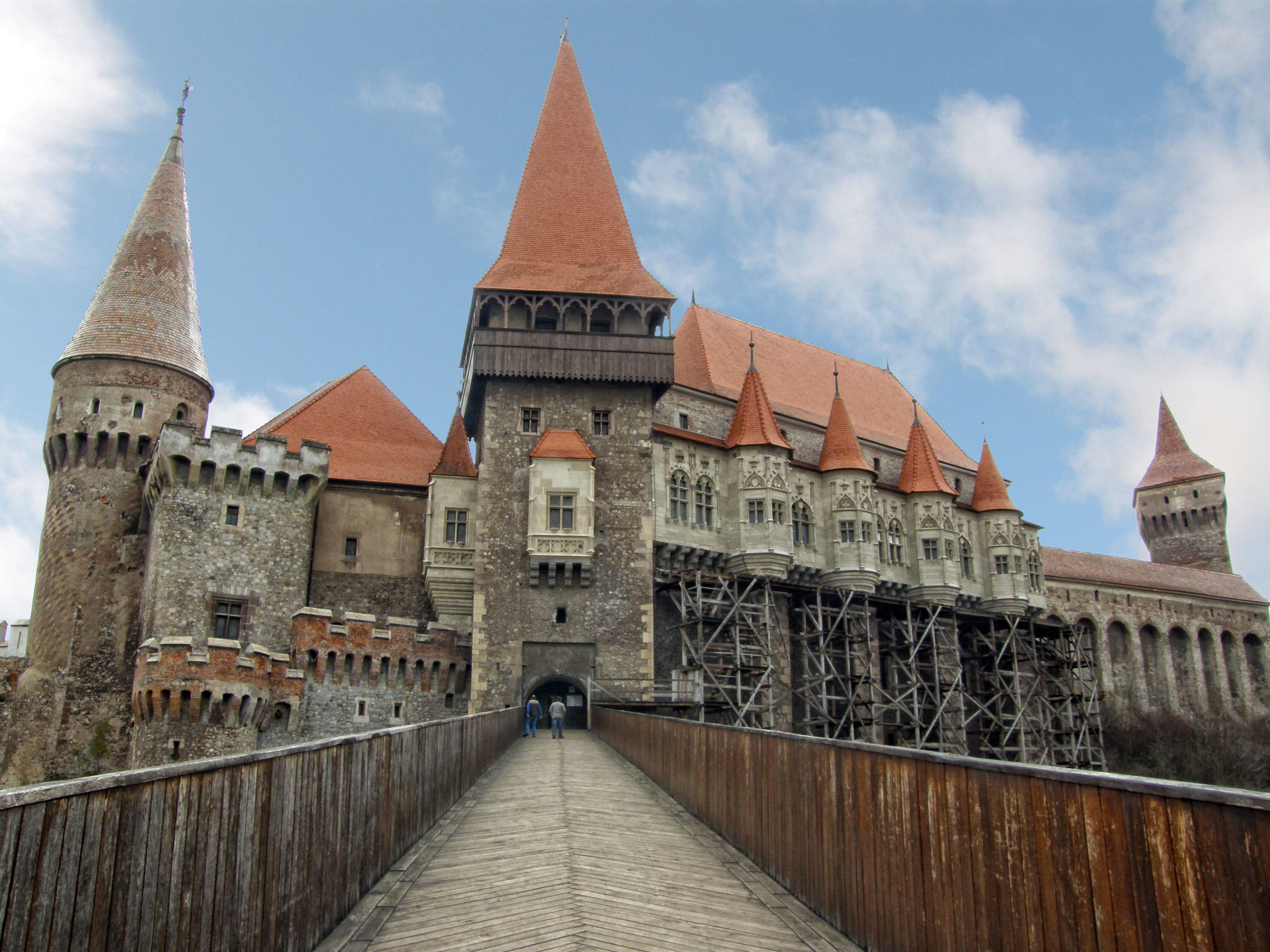 Castelul Huniazilor